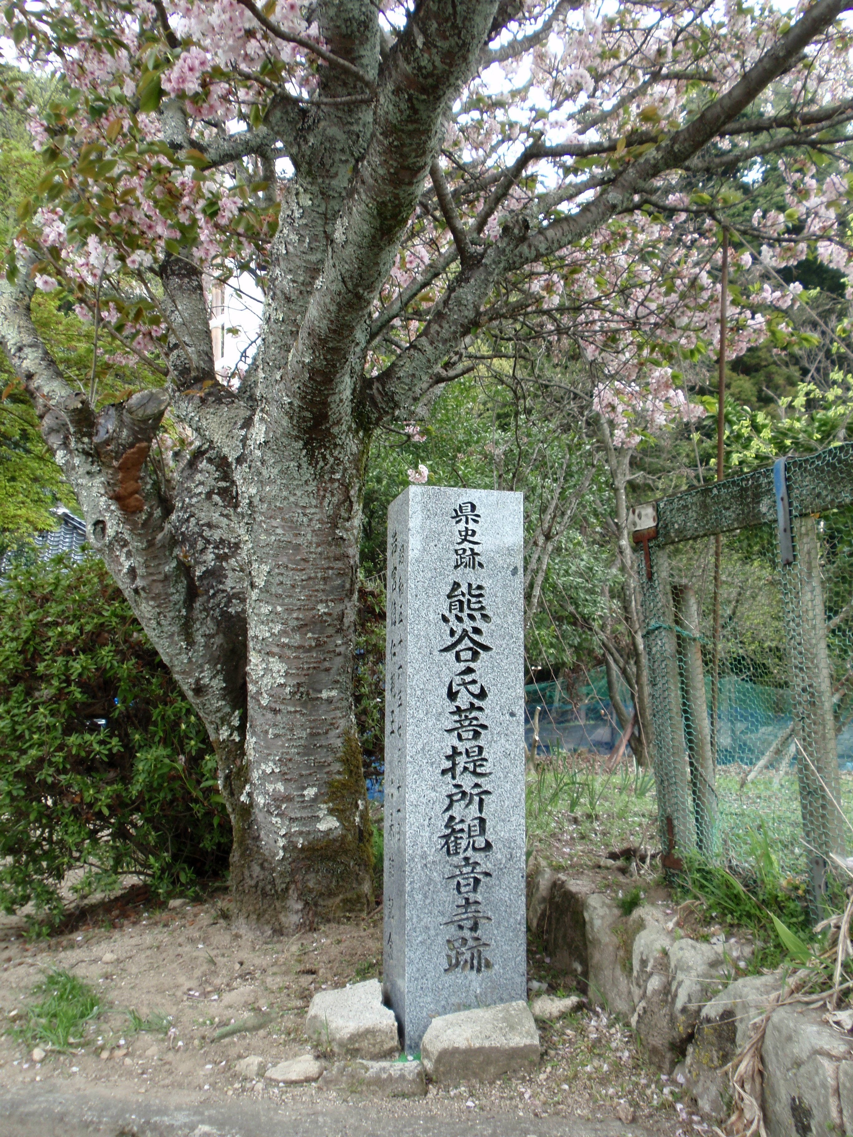 観音寺跡石碑